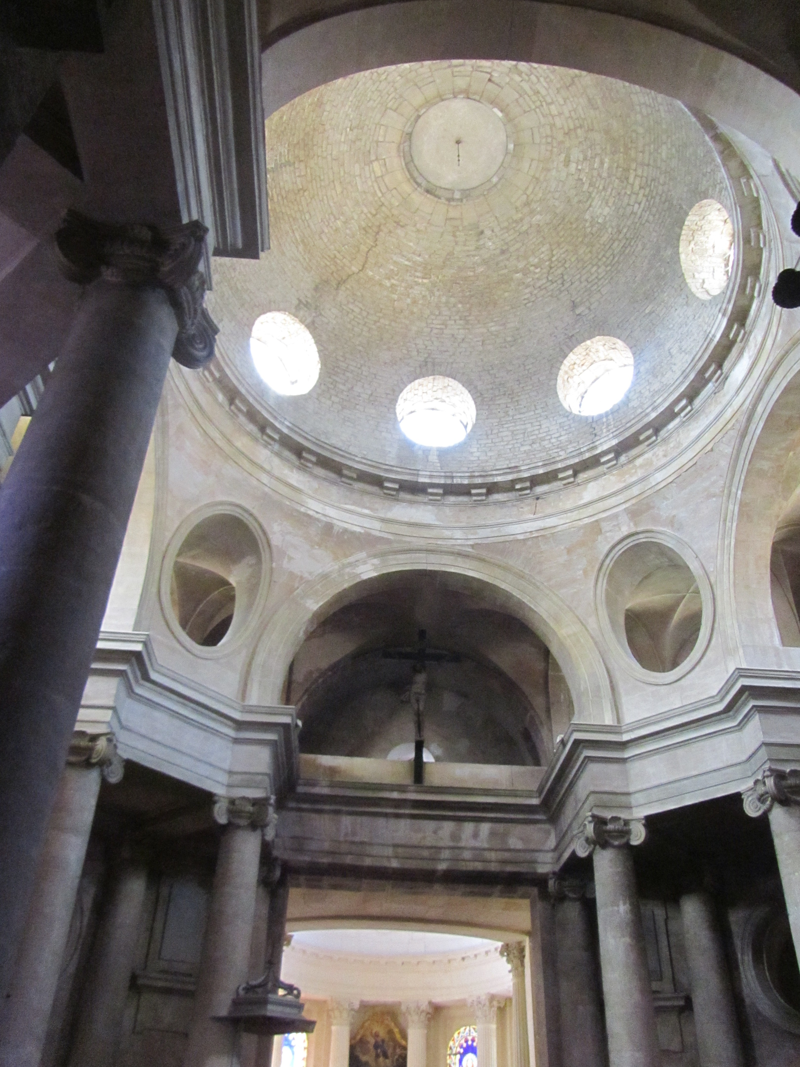 Coupole de la nef de l'église de Givry